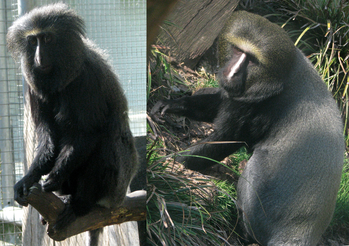 Femelle et mâle cercopithèque de Hamlyn (Cercopithecus hamlyni). Photos Christophe Chauvin.